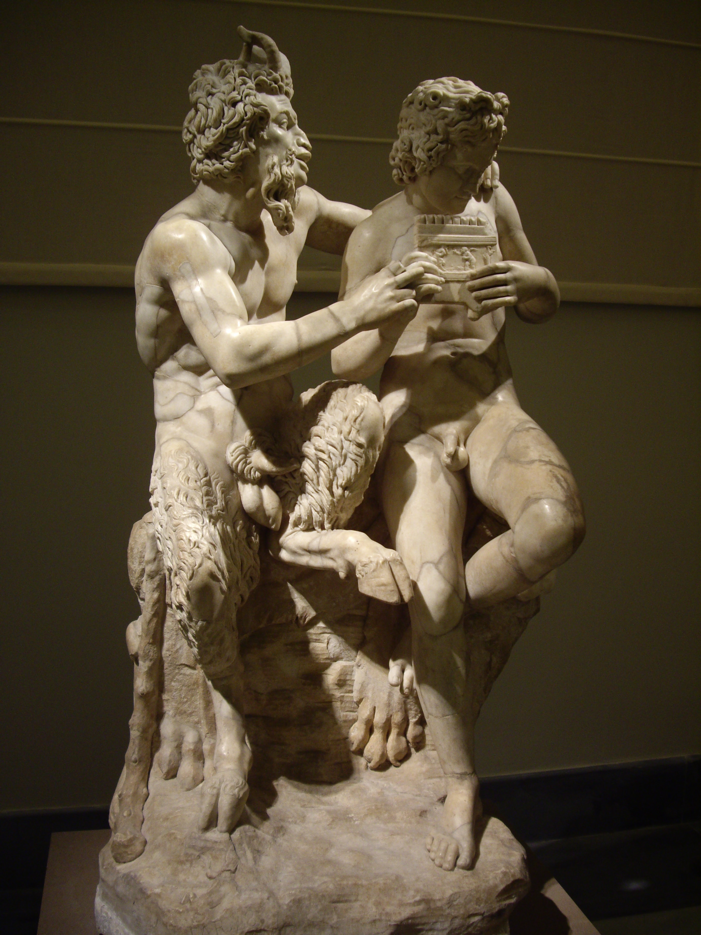 Pan e Dafni. Marmo, copia romana da un originale greco di Eliodoro (III-II sec. a.C.). Collezione Farnese, Museo archeologico nazionale di Napoli, Inv. 6329. H. 1.58 m.